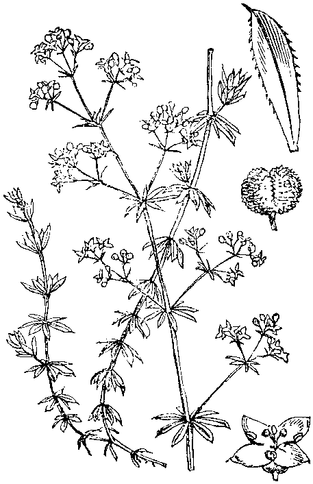 Slika 411. Barska lákota. (Gálium uliginósum.)